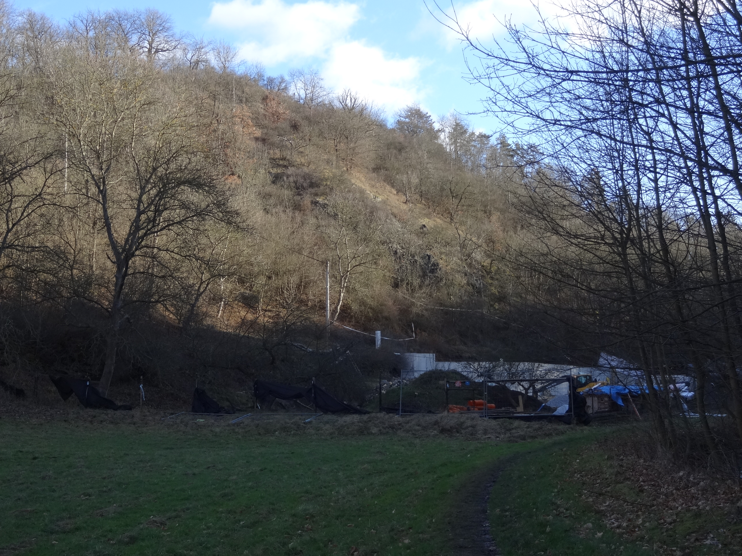 PP Vizerka v prosinci 2017, po demolici usedlosti Vizerka